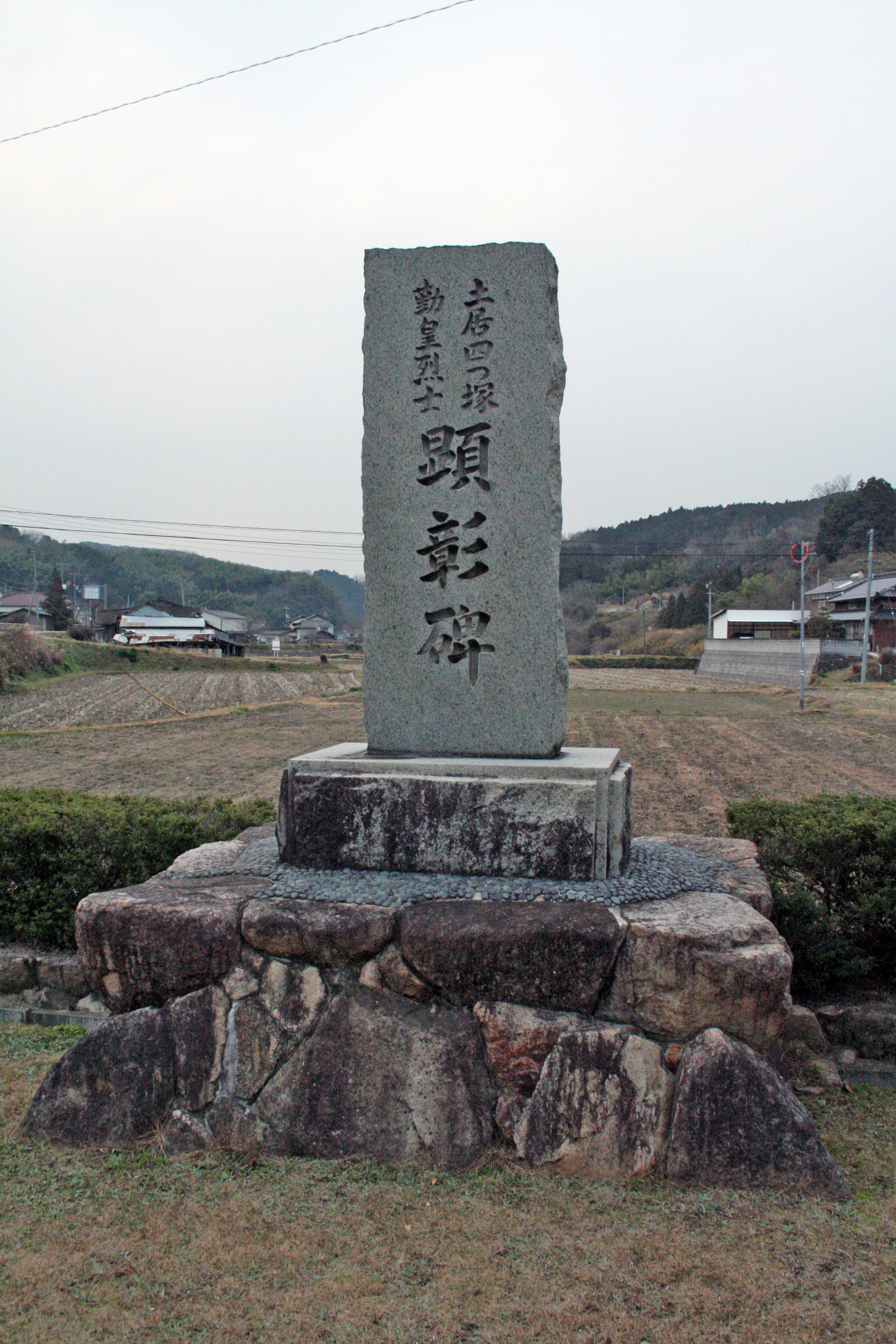 旧土居宿西惣門そばにある四つ塚志士顕彰碑。江戸時代末期、4人の志士達が盗賊と間違われて土居宿まで落ち延びたが、彼らがここへ到着した時、この門は閉じられておりその結果、4人は自殺を遂げた。この碑は彼らの最期を弔う為に作られたもの。